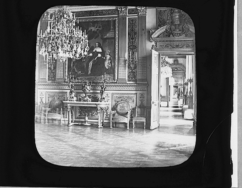 Salon Louis XIV du Palais des Tuileries